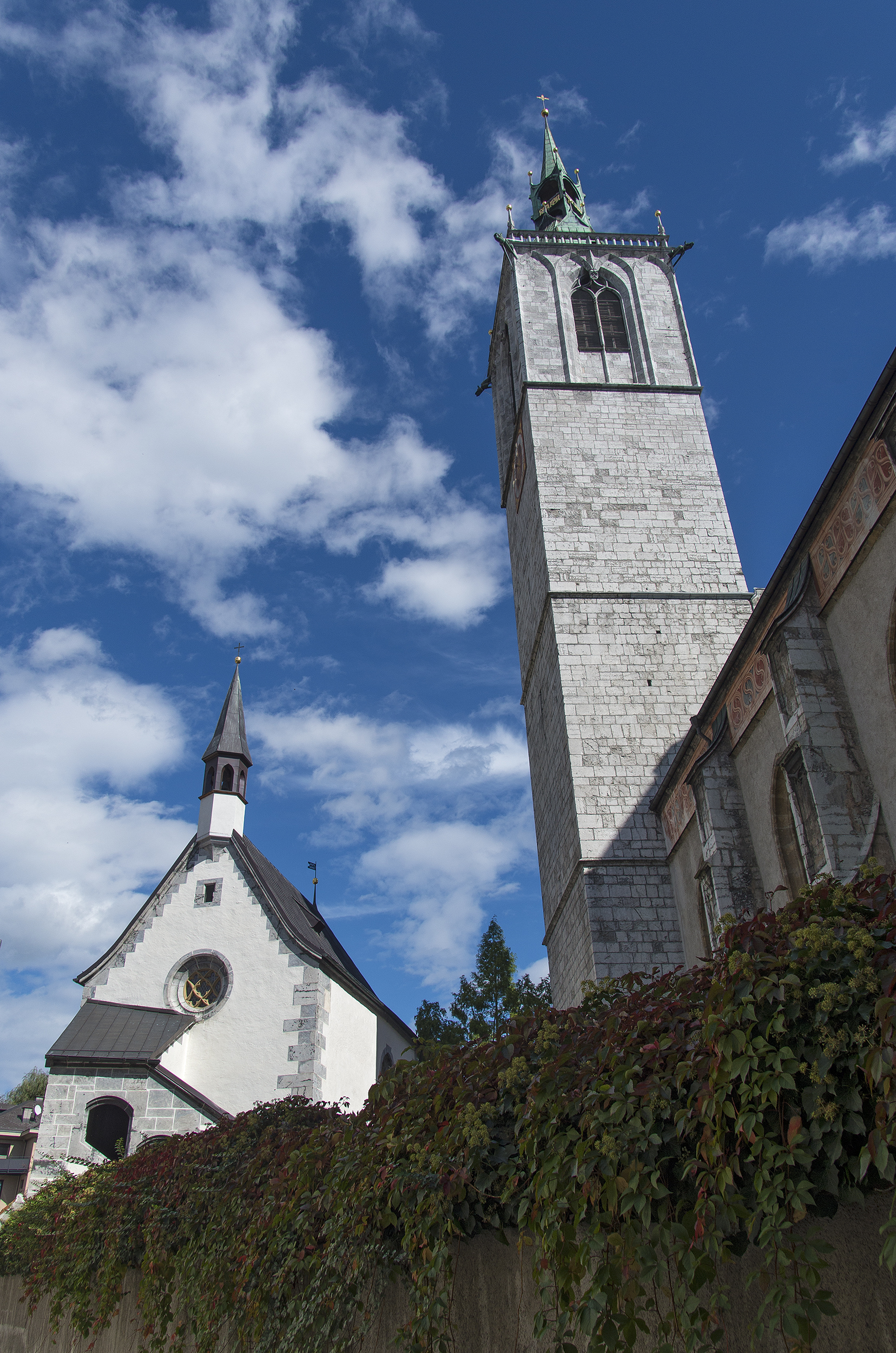 Silberstadt Schwaz: Illusionen? – Visionen! Pfarrkirche Schwaz Dieses Bild wurde anlässlich des österreichischen Tags des Denkmals 2014 in Tirol eingereicht.